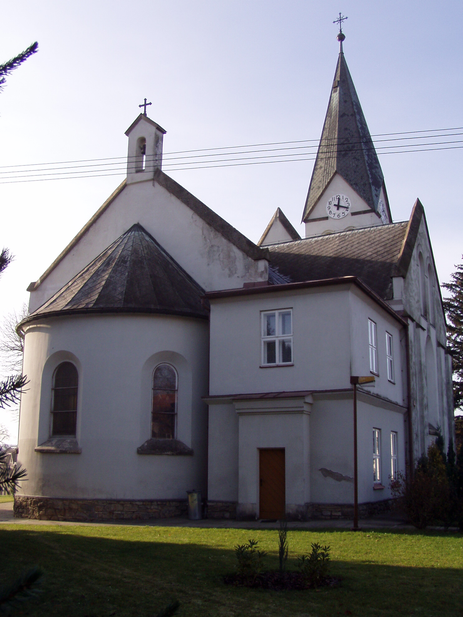 Kostel sv. Kateřiny (Prusinovice), Prusinovice